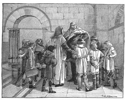 Illustration tirée de Histoire de France, cours élémentaire, Ernest Lavisse, Armand Colin, 1913, page 21 de l'éditon Heath de 1919.